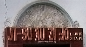 Вывеска на церкви лису, выполненная алфавитом Фрейзера. Уезд Фугун, провинция Юньнань (Китай).